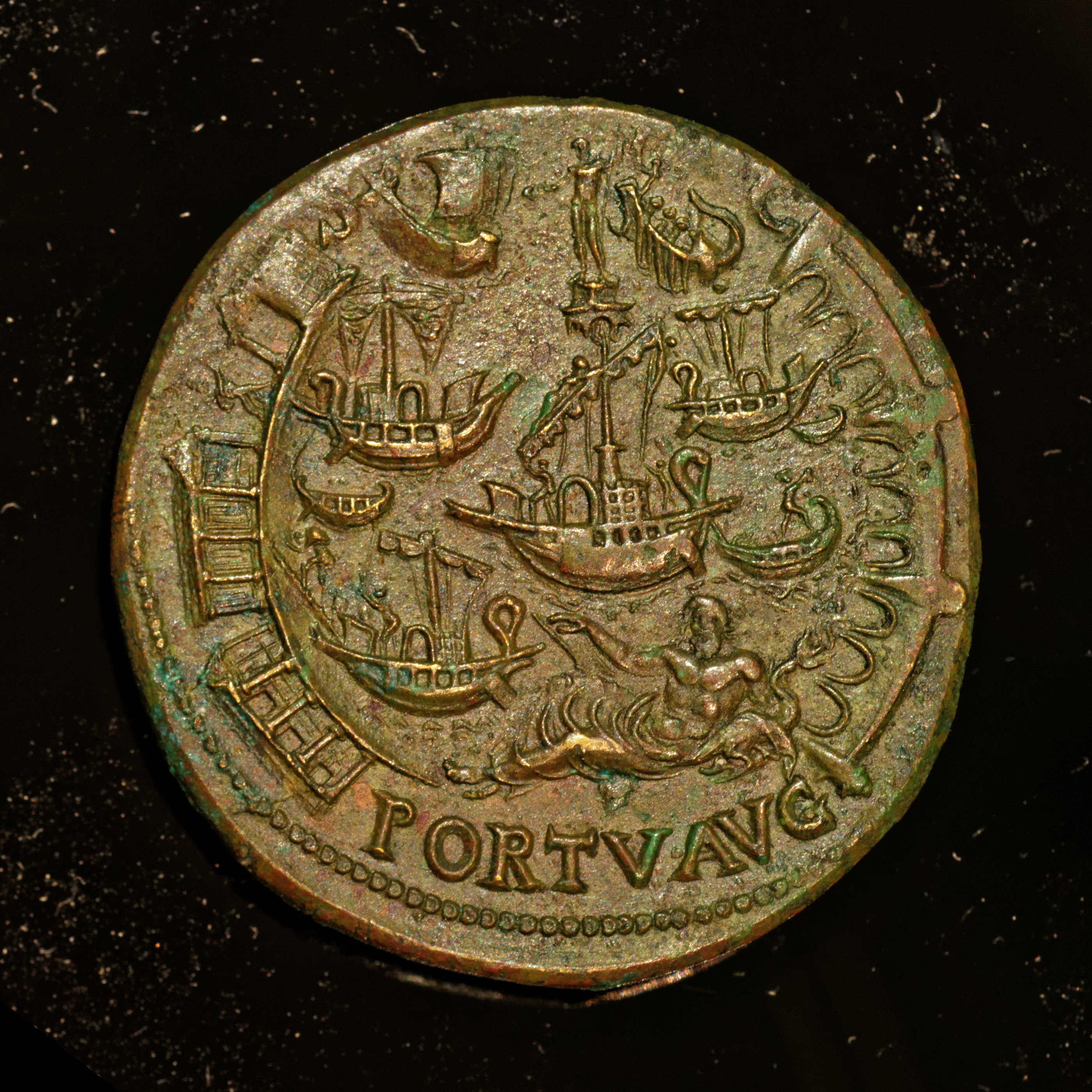 Exposition Claude Un Empereur au destin singulier, catalogue p. 246 Sesterce de Néron montrant Portus. Atelier monétaire de Lyon, 66 ap JC ; 33mm de diamètre, 26,69 g ; references : Cohen, Néron, C254 ; RIC, volume 1 de 1984 : variante du n° 514. Lugdunum - Musée et théâtres romains, 2002.1.1